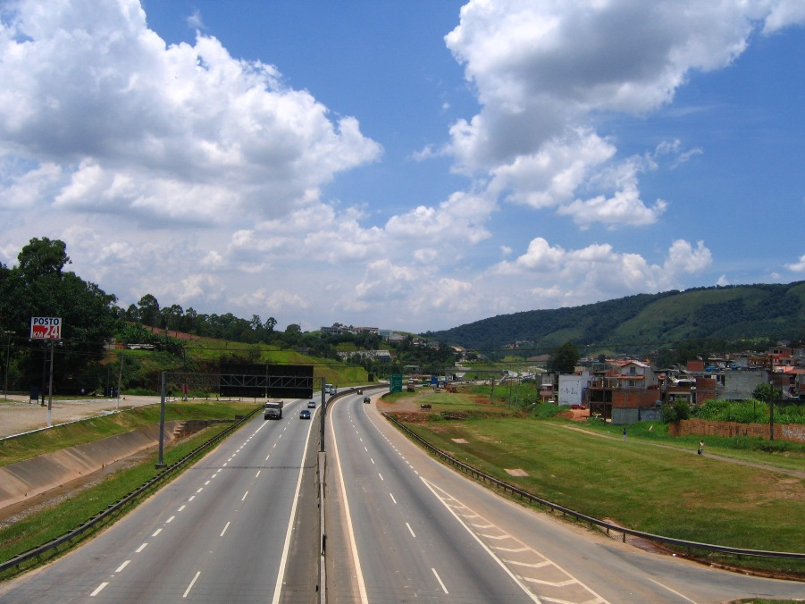 Via Anhanguera